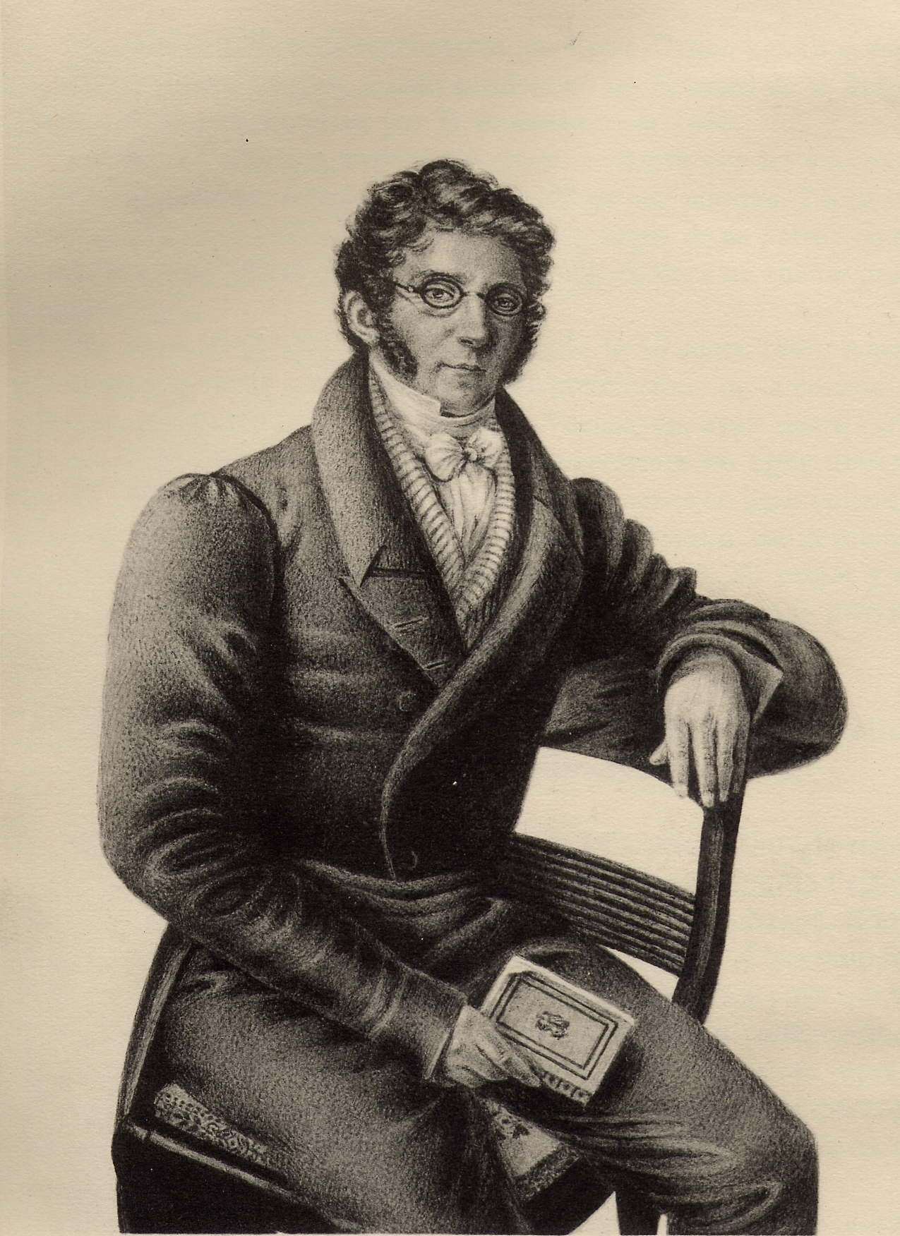 Portrait de François Anspach (1784-1858), député Belge et conseiller communal de Bruxelles.